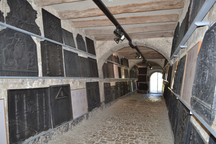 Salle plaques de cheminées